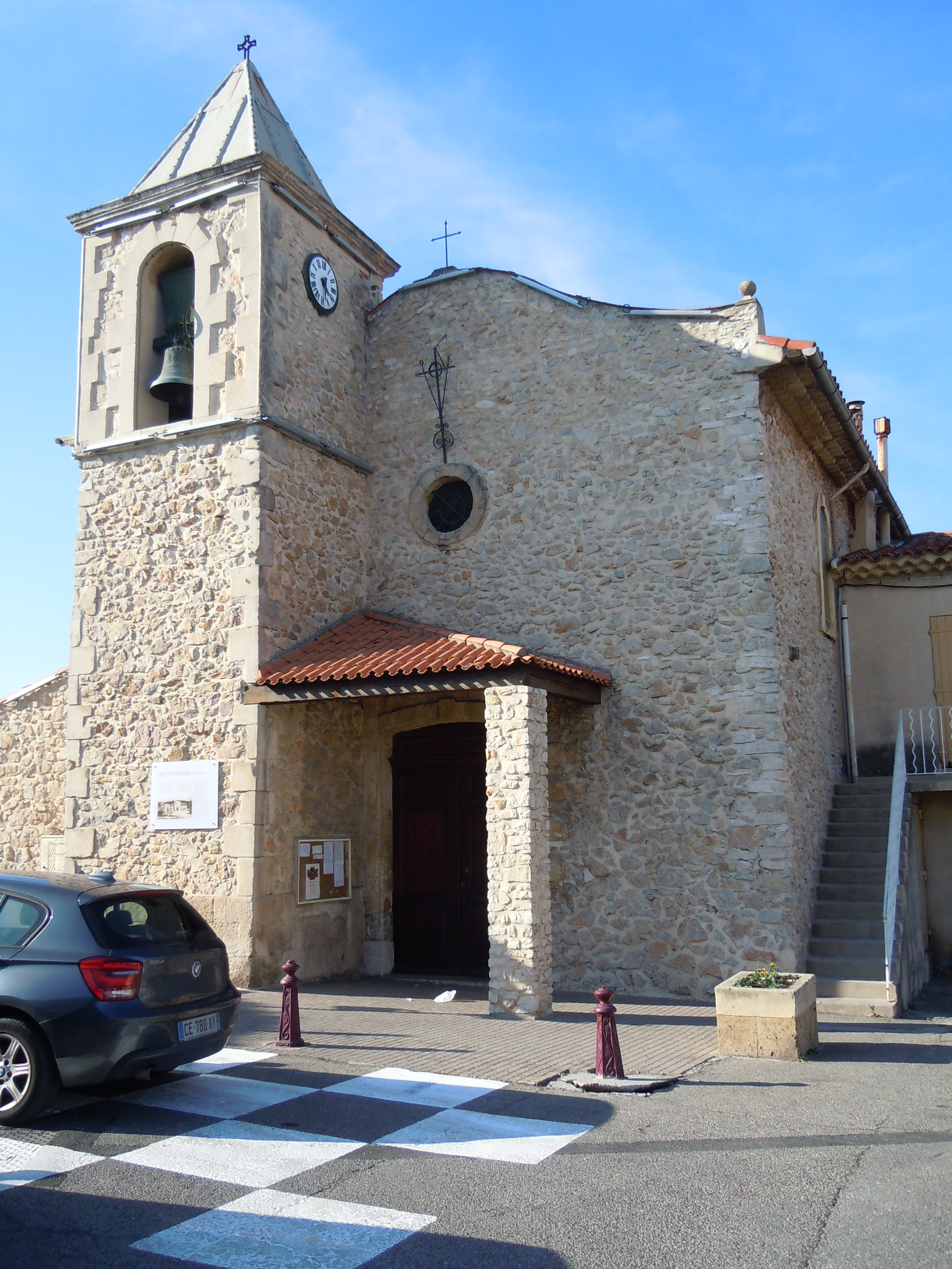 Eglise des Cadeneaux, sur la commune des Pennes-Mirabeau, consacrée le 3 mai 1739 par Mgr de Belsunce, Evêque de Marseille